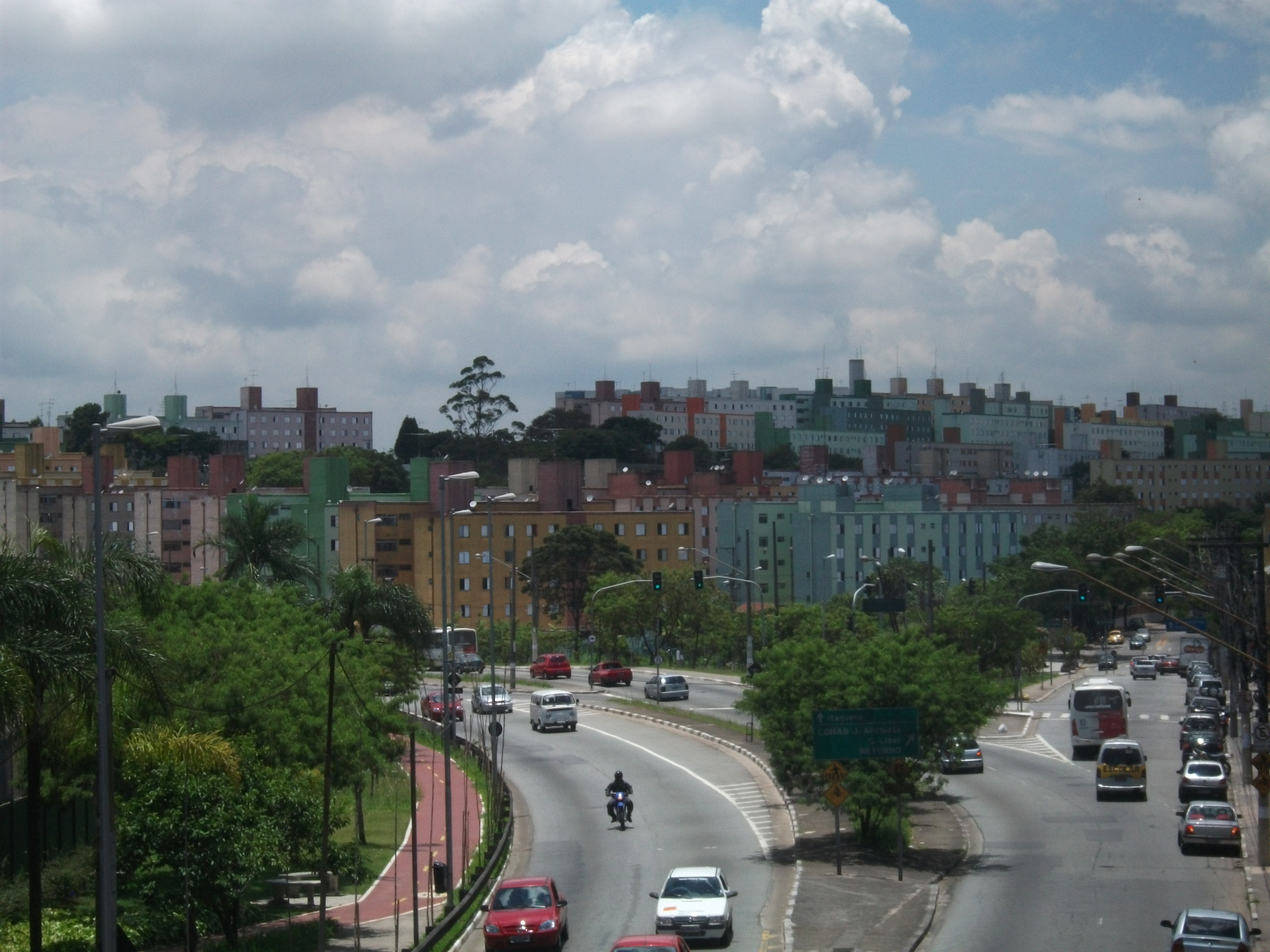 Vista de prédios da COHAB Padre Manuel da Nóbrega no distrito de Artur Alvim em São Paulo SP.